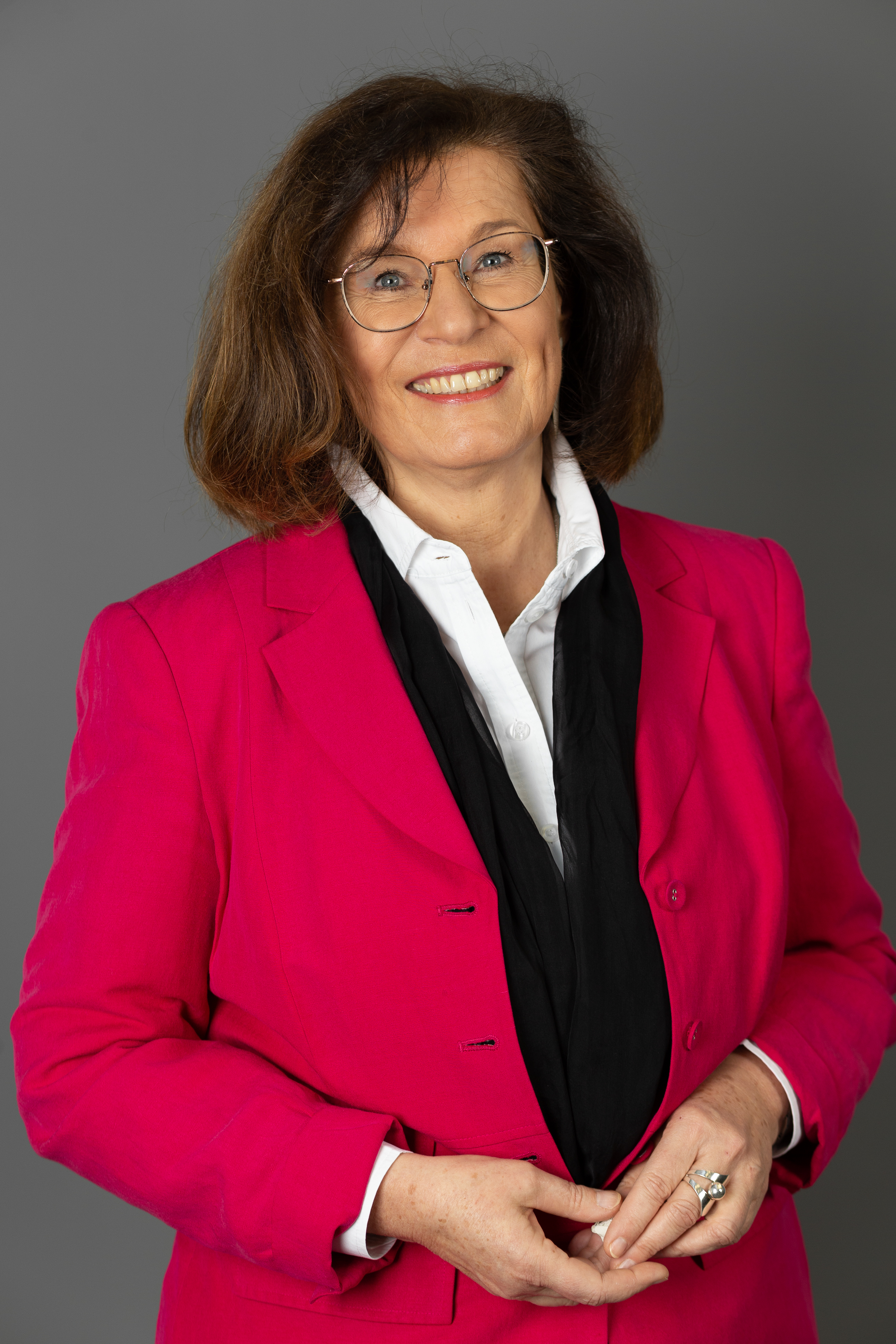 Deutscher Bundestag; Antje Tillmann, CDU